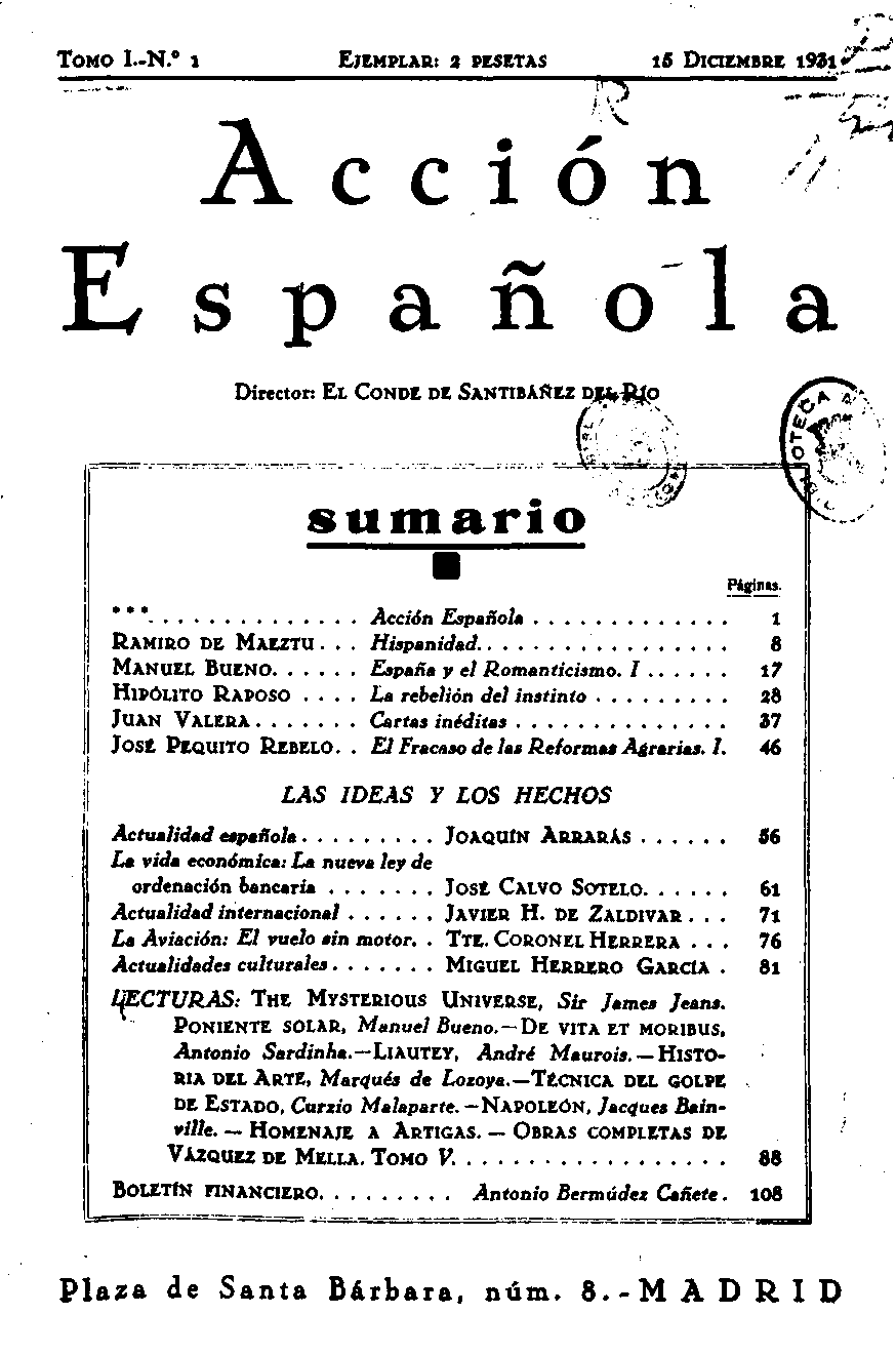 Portada del primer número de Acción española, del 15 de diciembre de 1931.